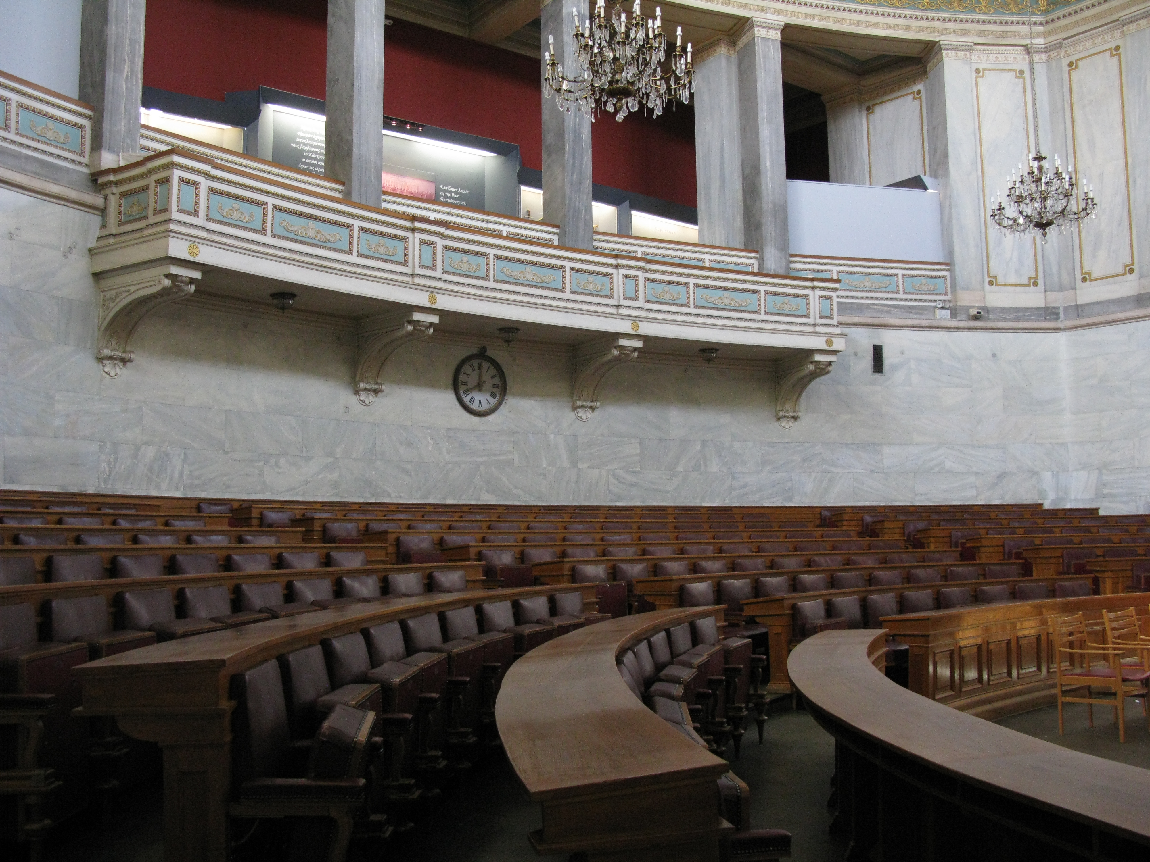 National Historical Museum. Athens, Greece. --- Βασιλικά Θεωρεία - Ιστορική αίθουσα συνεδριάσεων Ελληνικού κοινοβουλίου (1875-1935). Εθνικό Ιστορικό Μουσείο. Αθήνα.